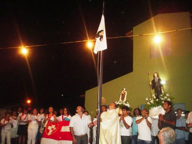 I Festa de São Bento em Janduis Rn, no ano de 2008